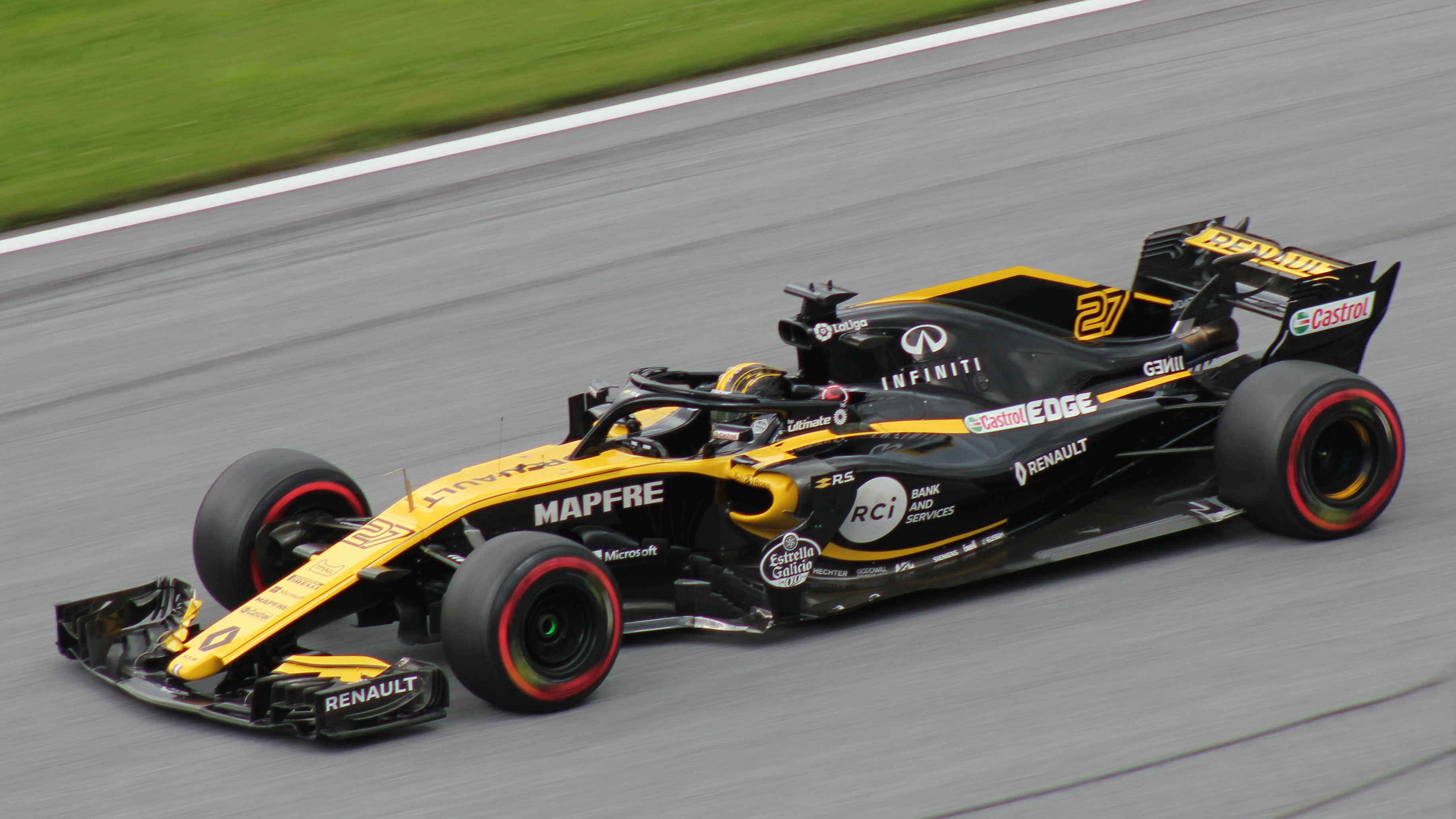 27 Hülkenberg beim Rennwochenende in Österreich 2018